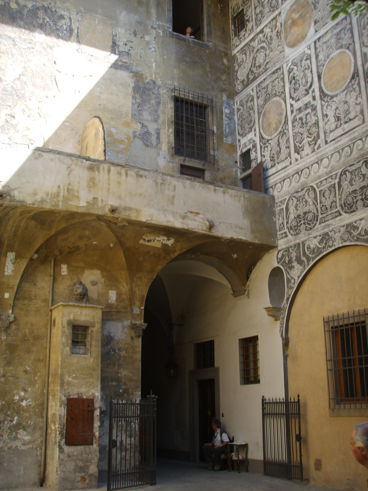 Palazzo pepi cortile